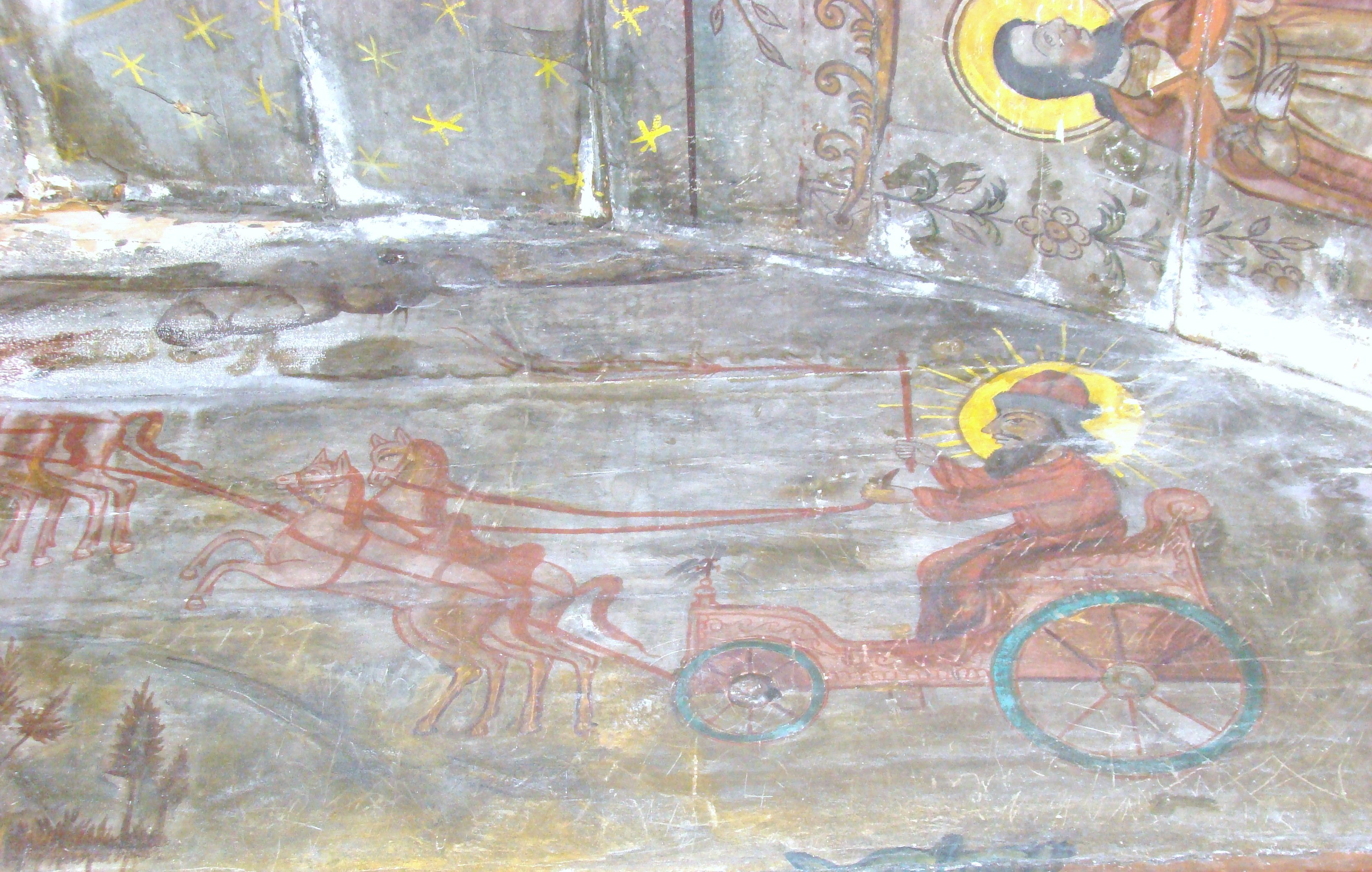 Biserica de lemn din Ticu-colonie, județul Cluj